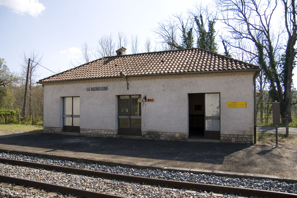 Gare SNCF de la commune de La Bachelerie, France